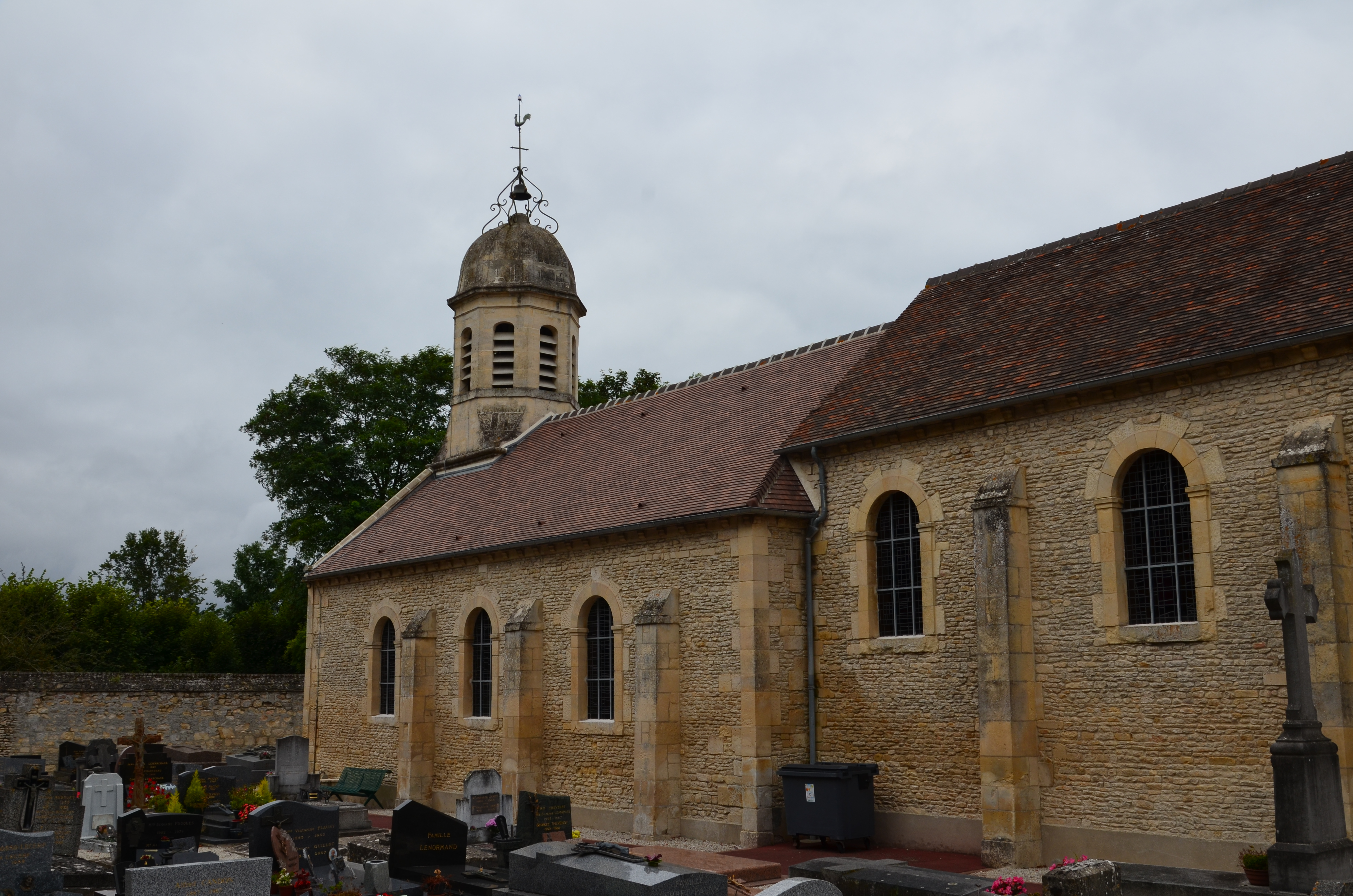 Église Saint-Martin de Cormelles-le-Royal.